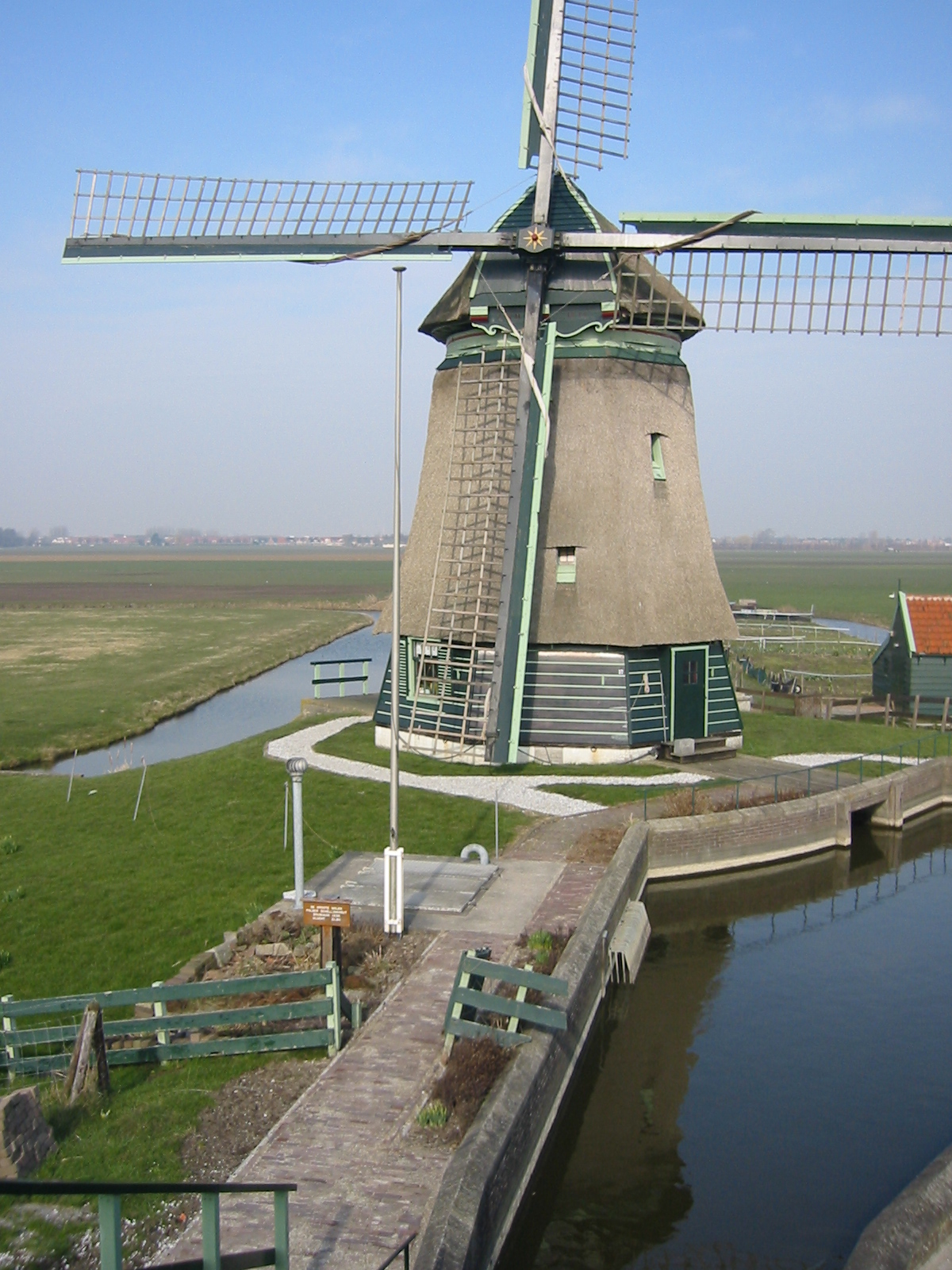 Eigen foto: Molen aan Westfriese ringdijk bij Schellinkhout. Laat goed het hoogteverschil zien in de polder en de boezem. GerardM 9 mrt 2004 12:56 (CET)